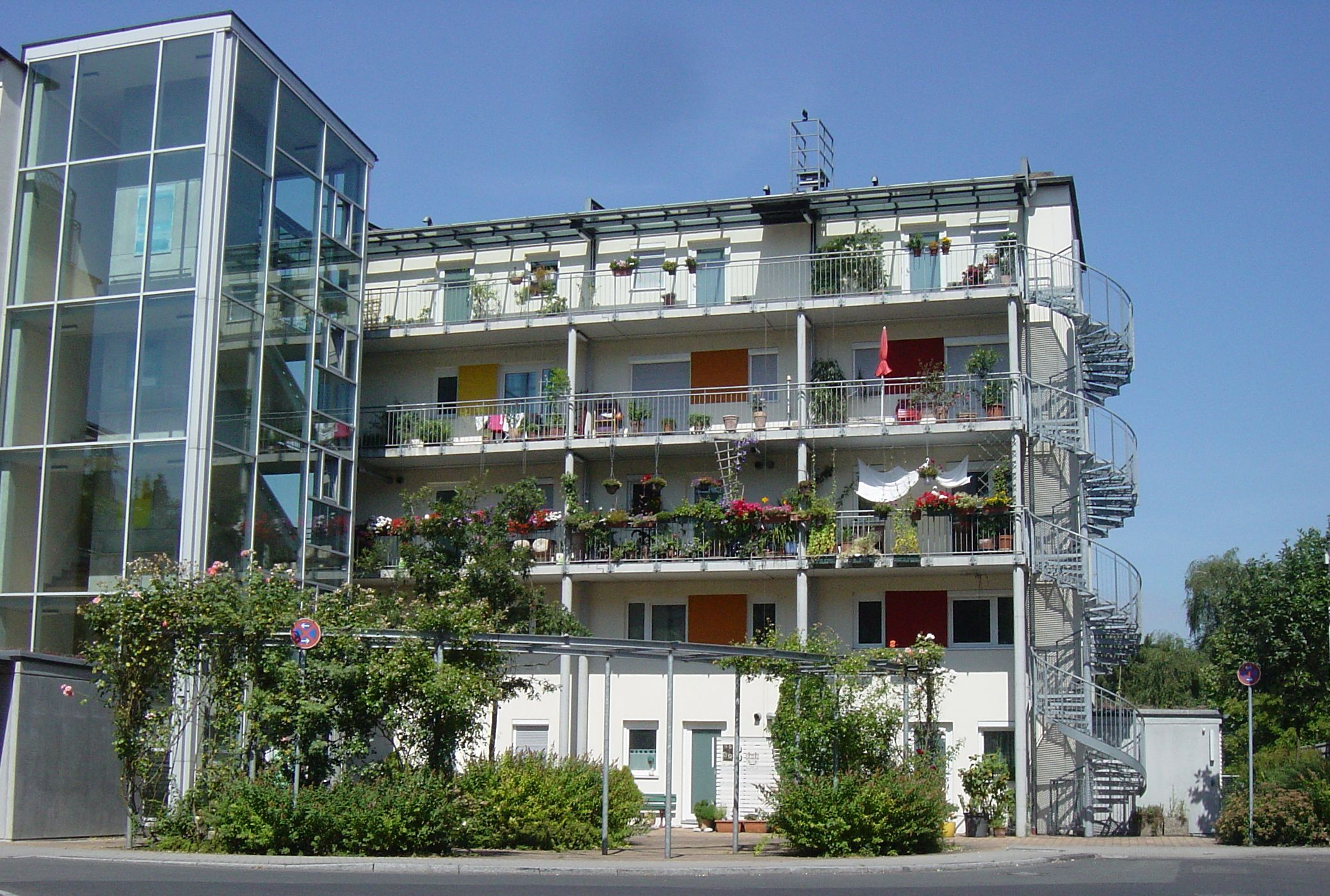 Frankfurt Bockenheim Grempstraße